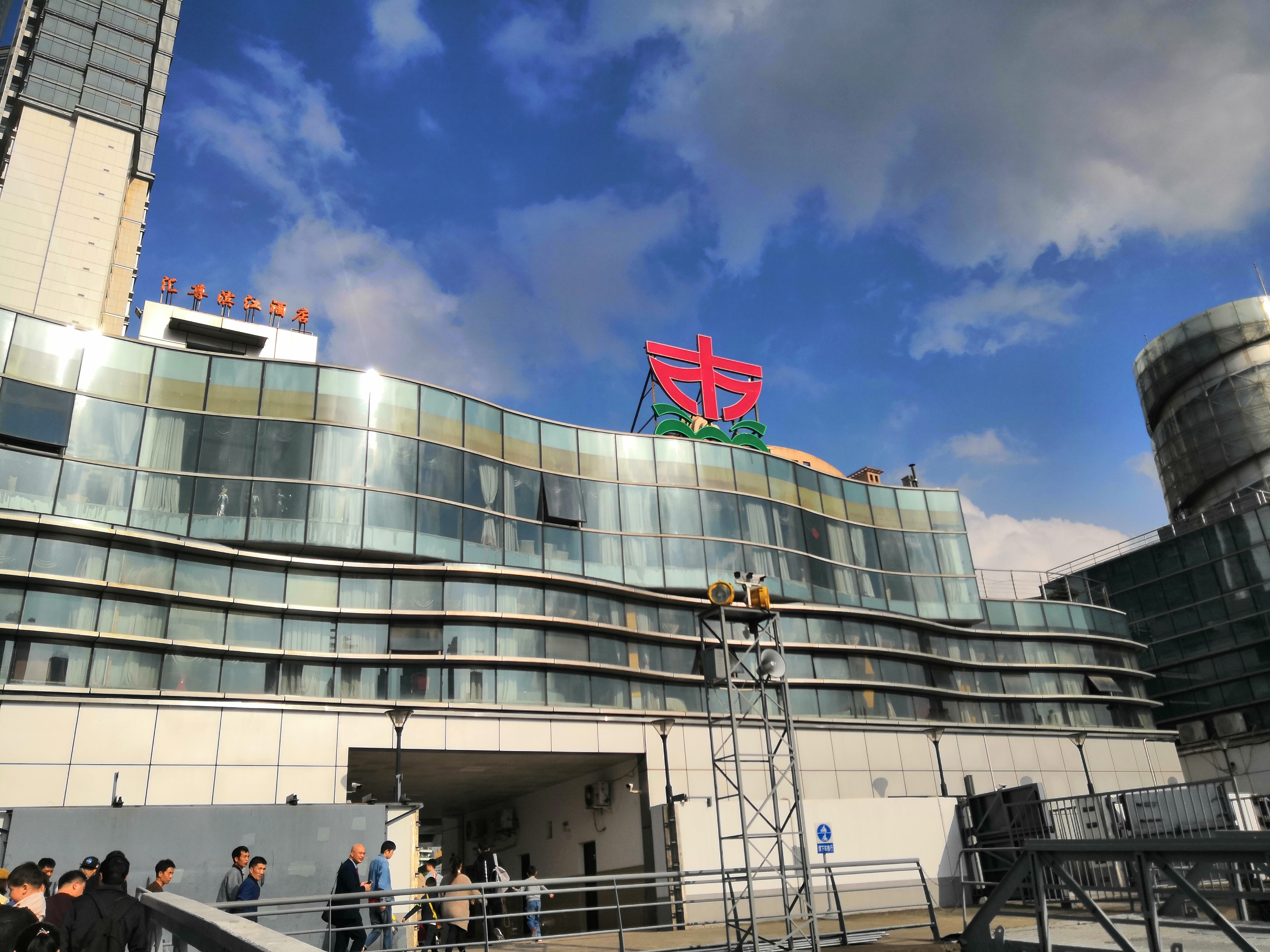 东昌路渡口大楼